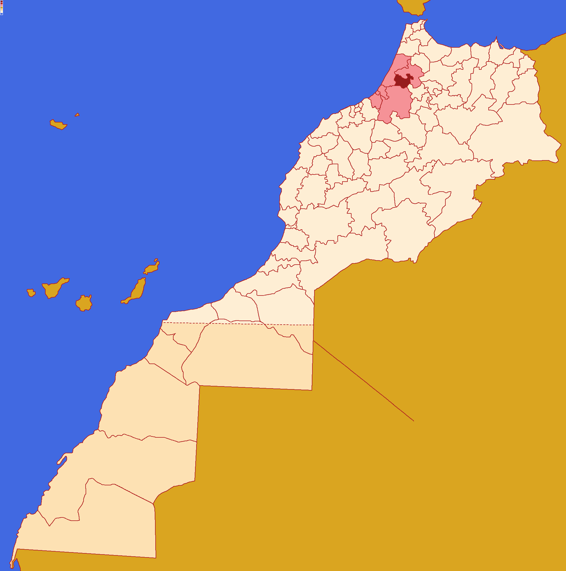 Localização da província de Sidi-Slimane dentro da região de Rabate-Salé-Quenitra e dentro de Marrocos. Conforme a reforma administrativa de 2015.